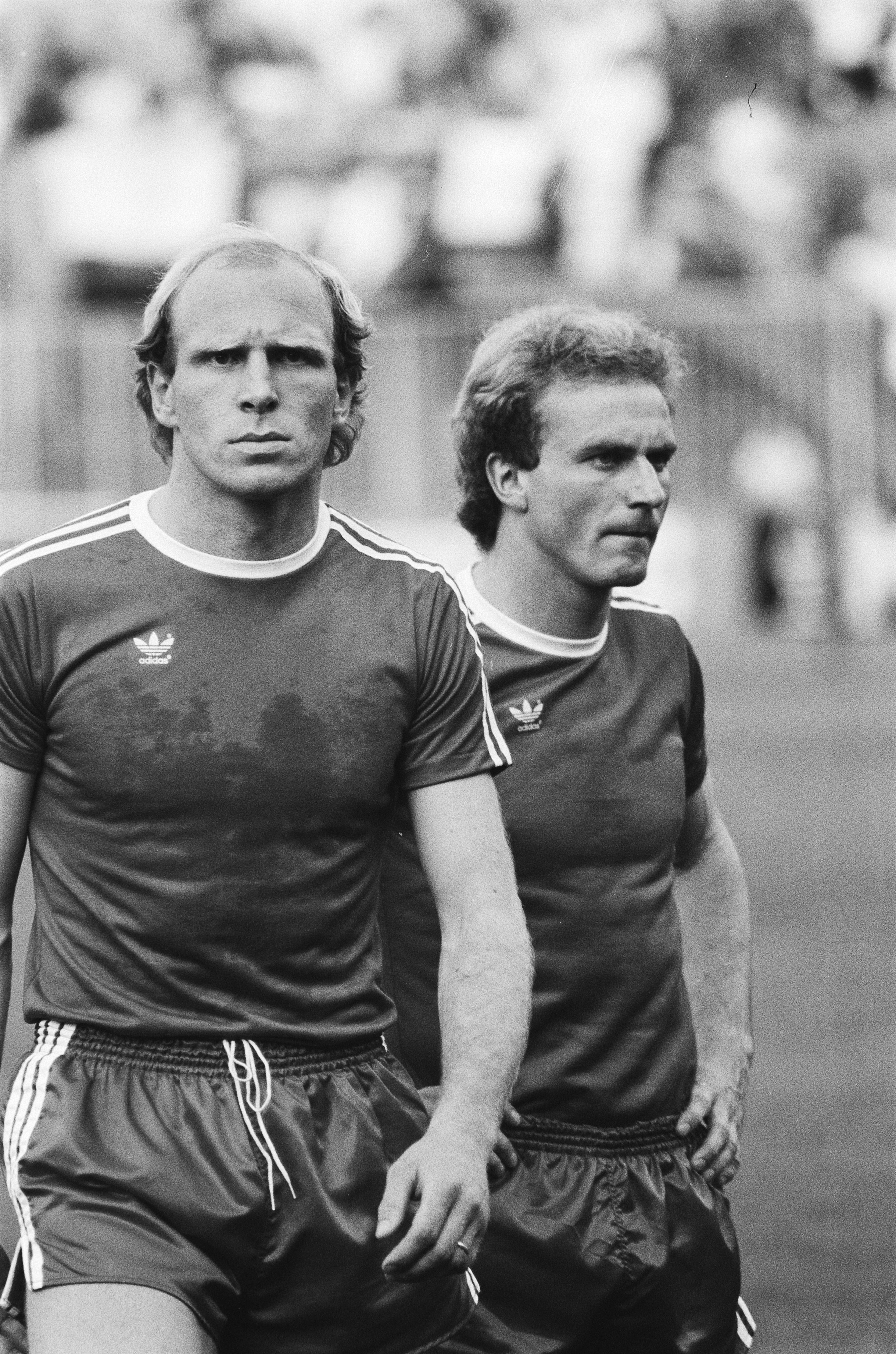 Collectie / Archief : Fotocollectie Anefo Reportage / Serie : [ onbekend ] Beschrijving : FC Bayern Munchen tegen Aston Villa 0-1 Europa Cup I 11a: Rummennige, close, 12a: Rummennige (r) en Hoeness, close, 13a, 14a: Rummennige (l) en Breitner (r), close / Datum : 26 mei 1982 Trefwoorden : sport, voetbal Persoonsnaam : Aston Villa, Fc Bayern Munchen Fotograaf : Antonisse, Marcel / Anefo Auteursrechthebbende : Nationaal Archief Materiaalsoort : Negatief (zwart/wit) Nummer archiefinventaris : bekijk toegang 2.24.01.05 Bestanddeelnummer : 932-1817